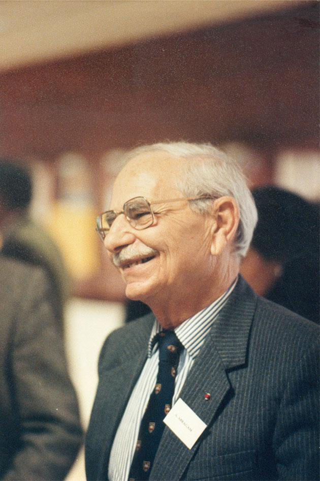 Анатоль Абрагам в 1994 году на праздновании своего 80-летия